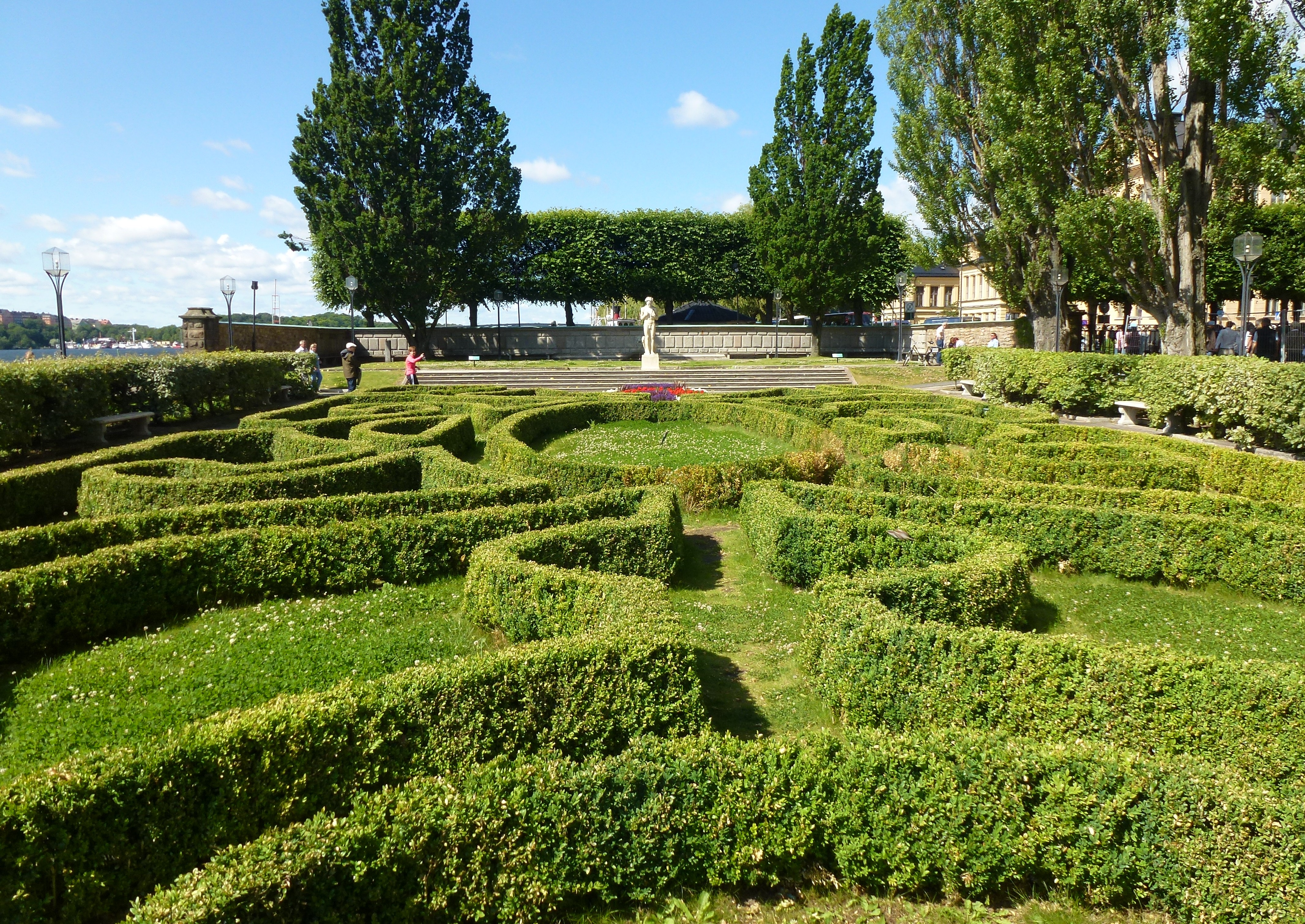 Stadshusparken Broderiparterren